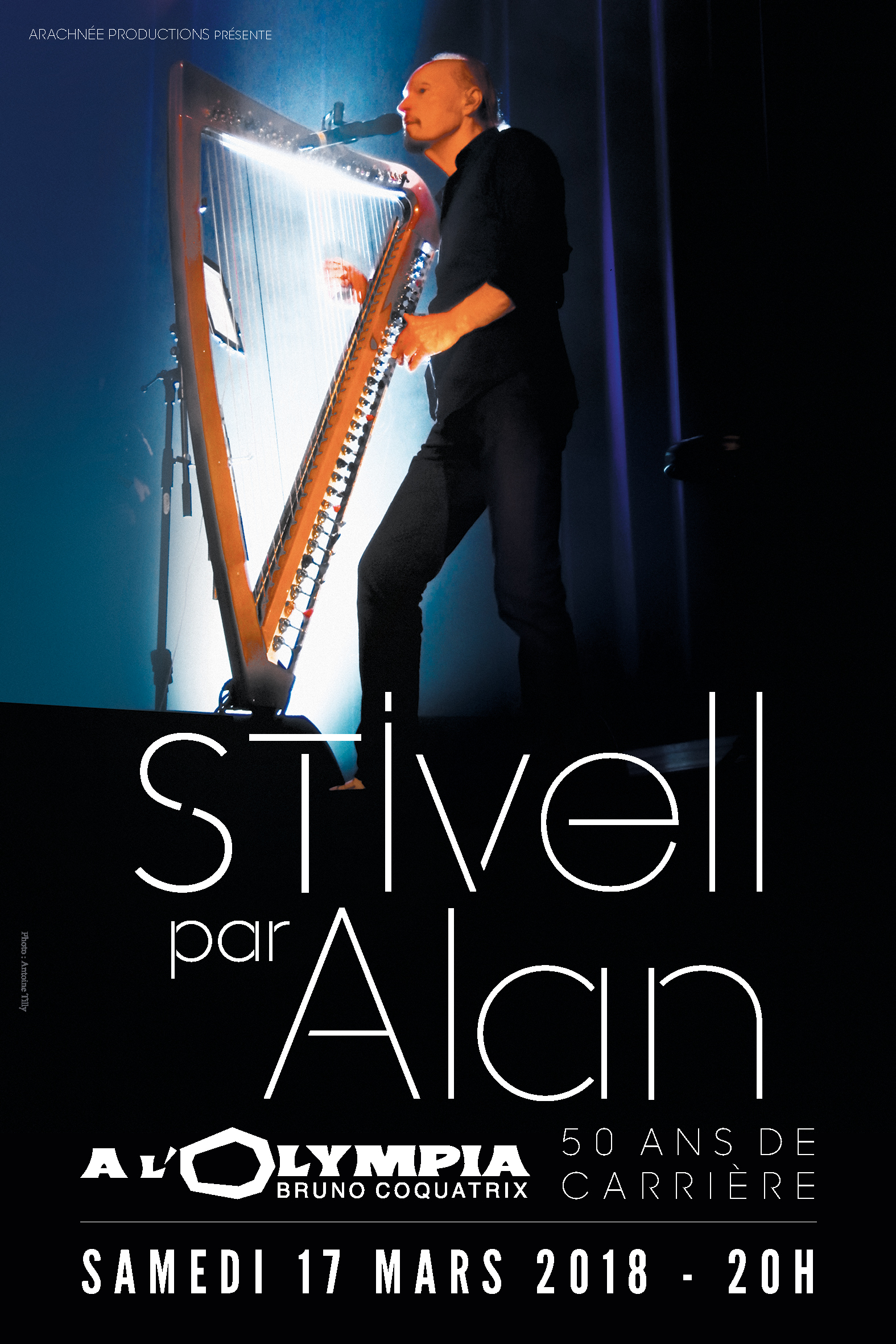 Affiche du concert d'Alan Stivell à l'Olympia (Paris) le 17 mars 2018, le soir de la Saint-Patrick. Photo Antoine Tilly.